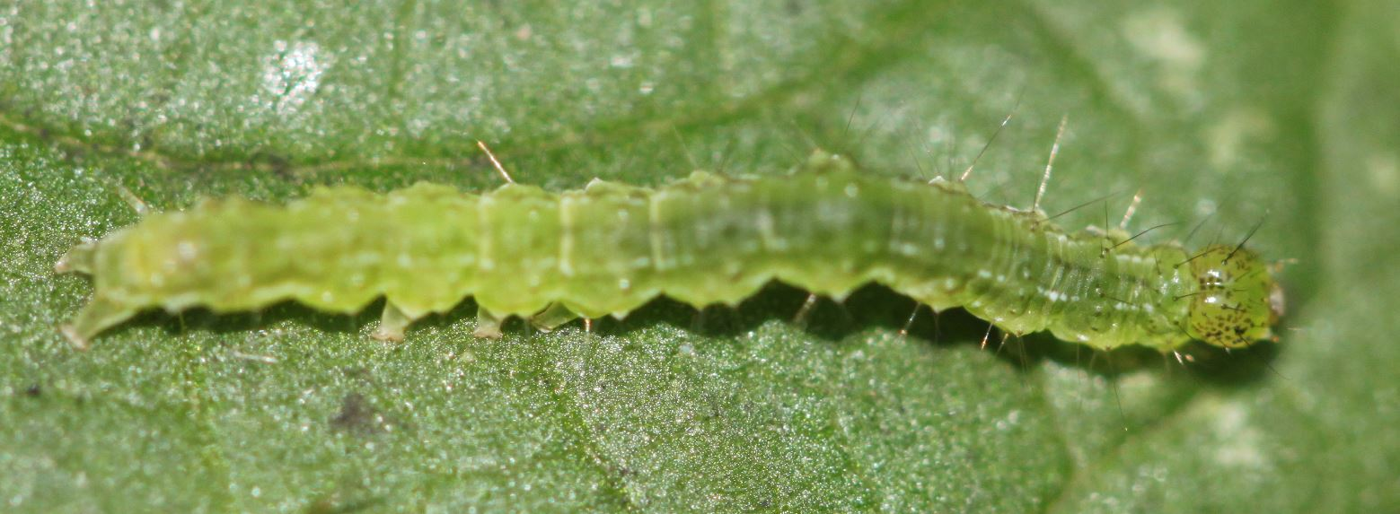 Raupe der Nessel-Schnabeleule (Hypena proboscidalis) am 27.9.2016 in der Schwetzinger Hardt